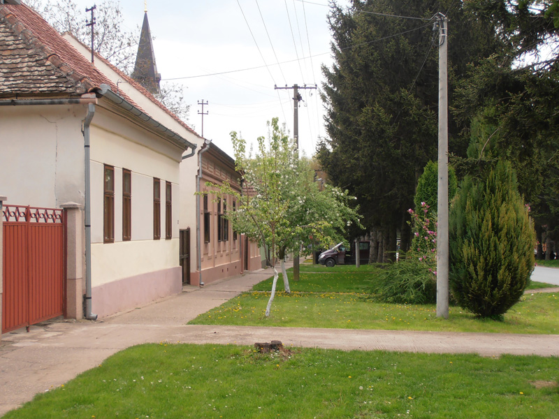 Erdevik Lenjinova ulica, April,2012.